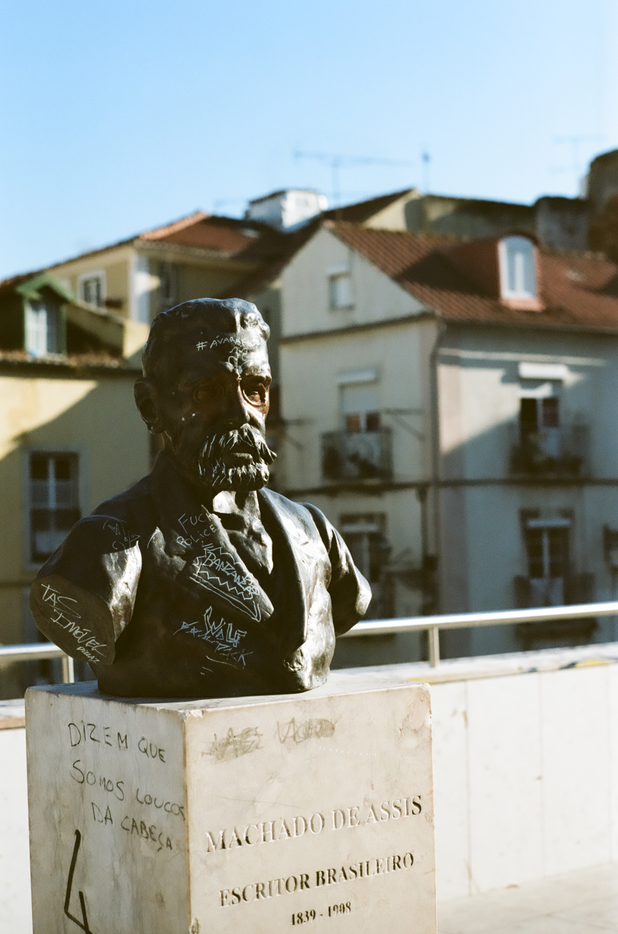 poetisized